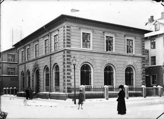 Fyrir 1915, Landsbankinn við Austurstræti. Kona klædd mjög fínni kápu og með hatt í forgrunni. Ljósmyndari / Photographer: Magnús Ólafsson Format: Glerplata / Glass negatives, 12 x 16 cm. Höfundarréttur / Rights Info: Enginn þekktur höfundarréttur / No known restrictions on publication. Geymsla / Repository: Ljósmyndasafn Reykjavíkur / Reykjavík Museum of Photography, Tryggvagata 15, 6. Hæð / 6th floor Númer myndar / Call Number: MAÓ 2656 Myndavefur Ljósmyndasafnsins / Reykjavík Museum of Photography´s photoweb: ljosmyndasafn.reykjavik.is/fotoweb/Grid.fwx